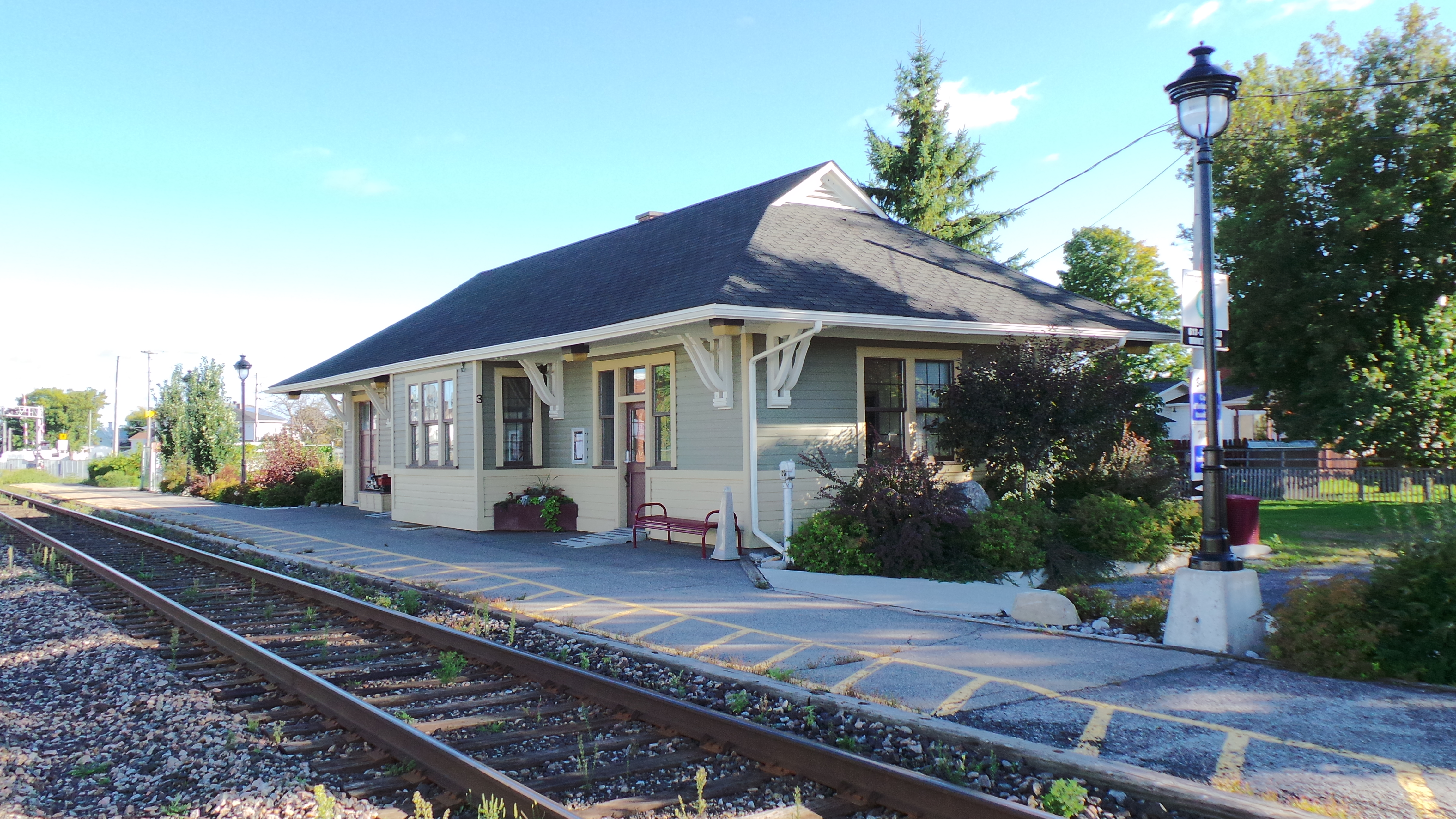 Gare de Casselman